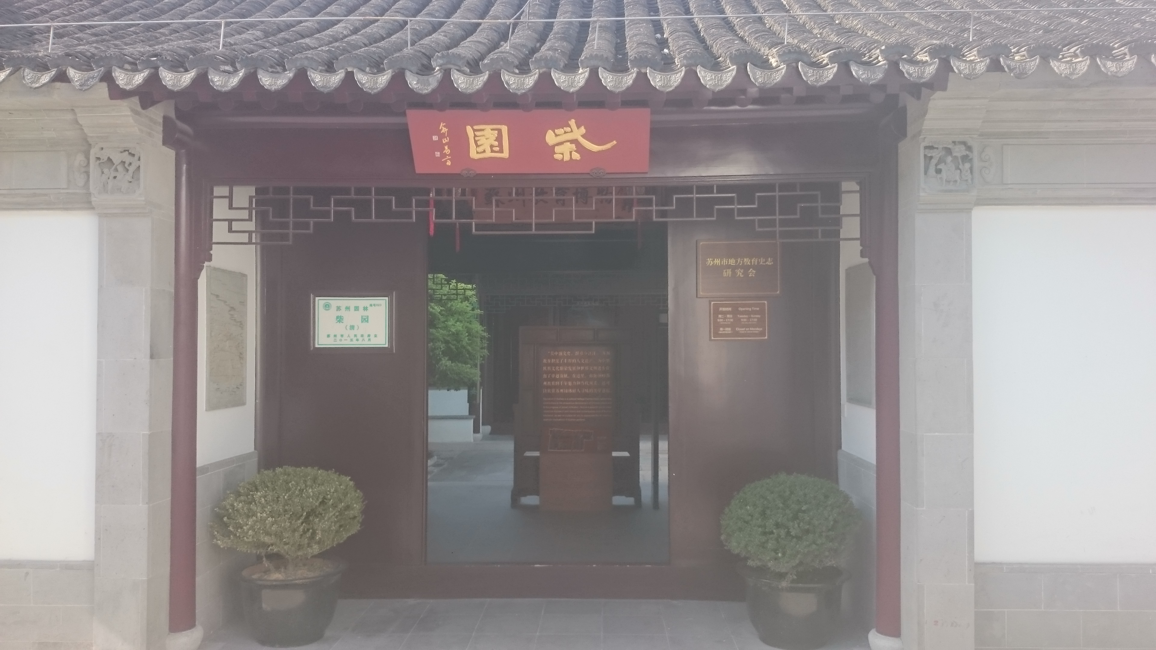 柴园 正门 苏州教育博物馆